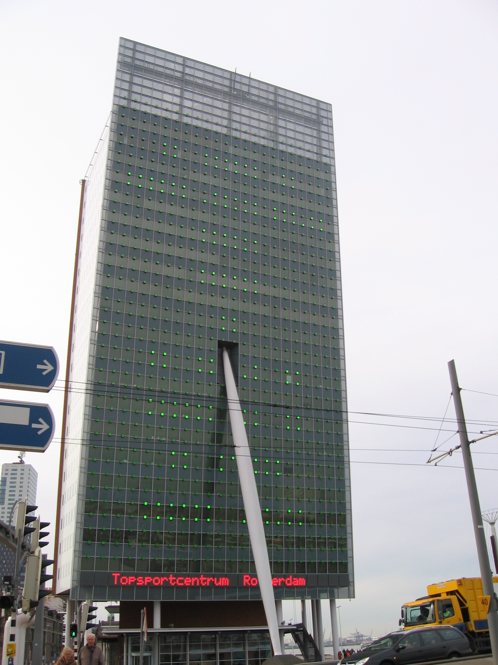 Toren op Zuid